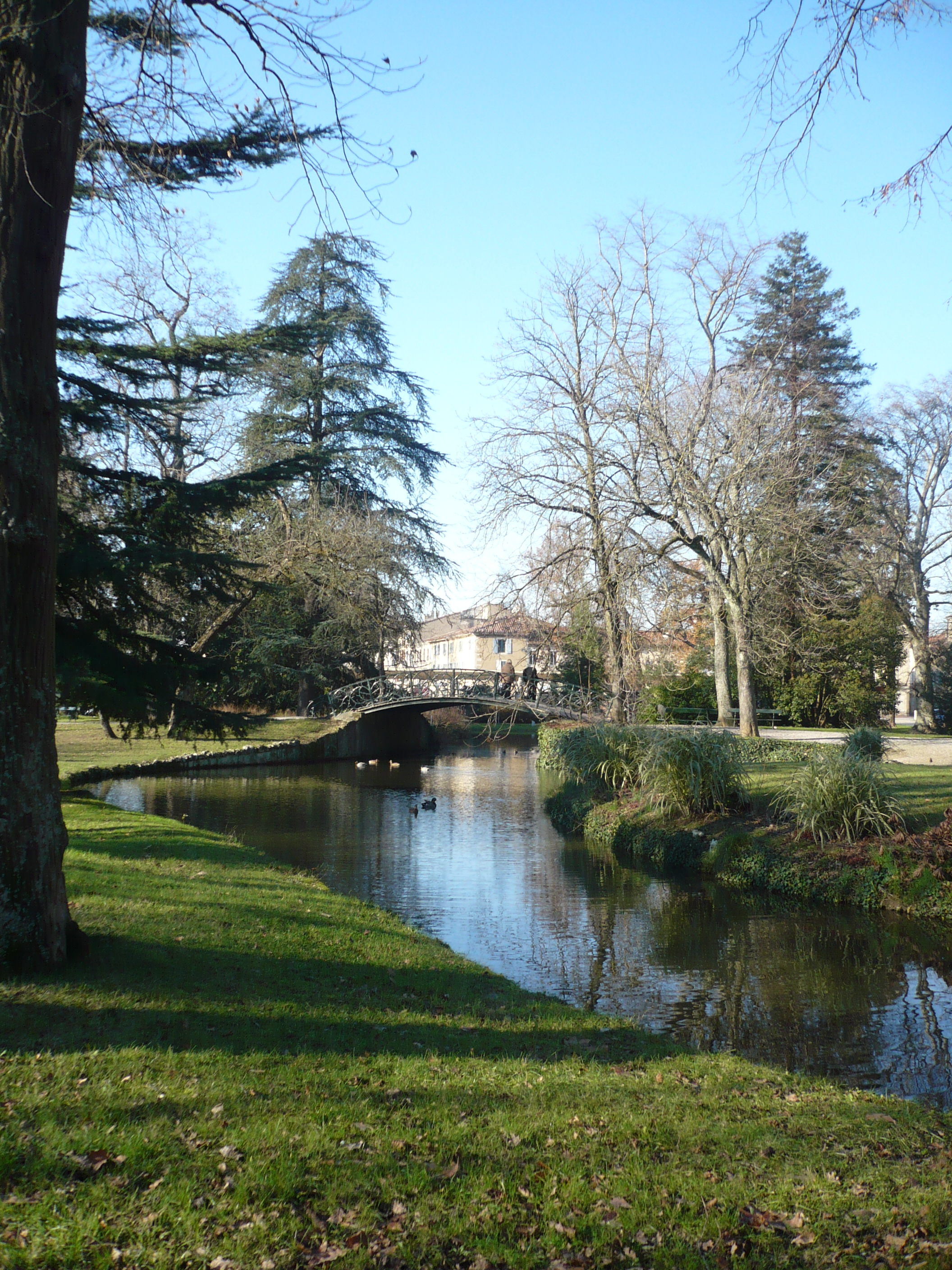 Castres